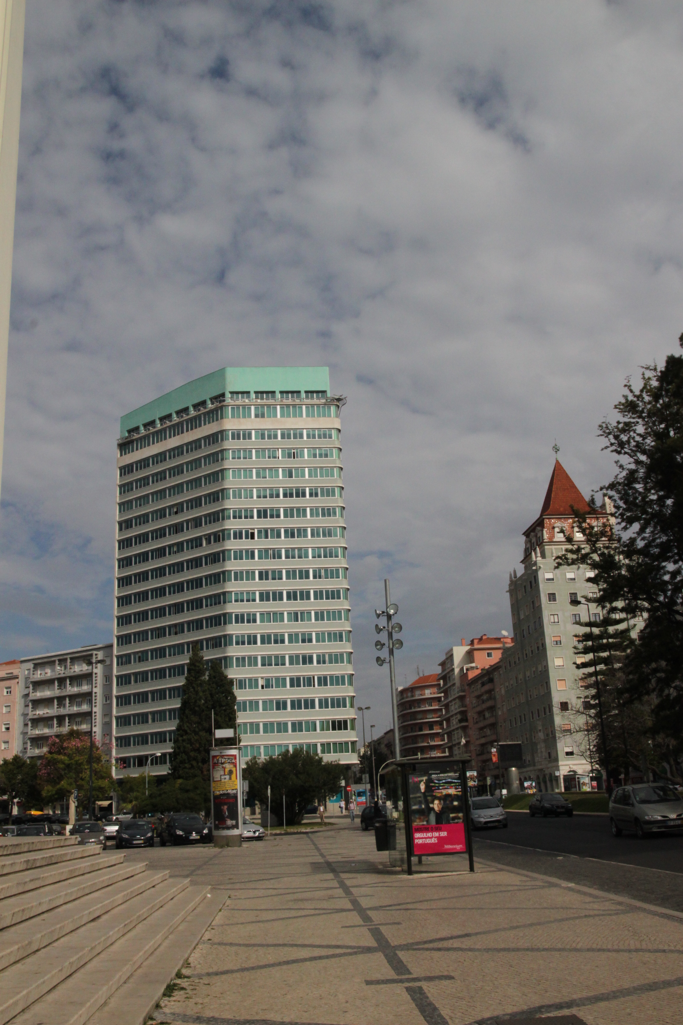 Edifício do Ministério do Trabalho e Segurança Social This file was uploaded for Wiki Loves Monuments in Portugal with the unique identifier 97024285.